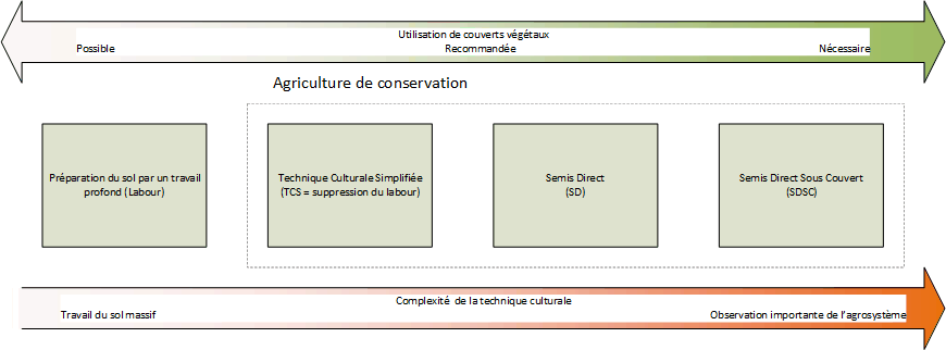 gradient des différentes techniques culturales: labour, TCS et SD